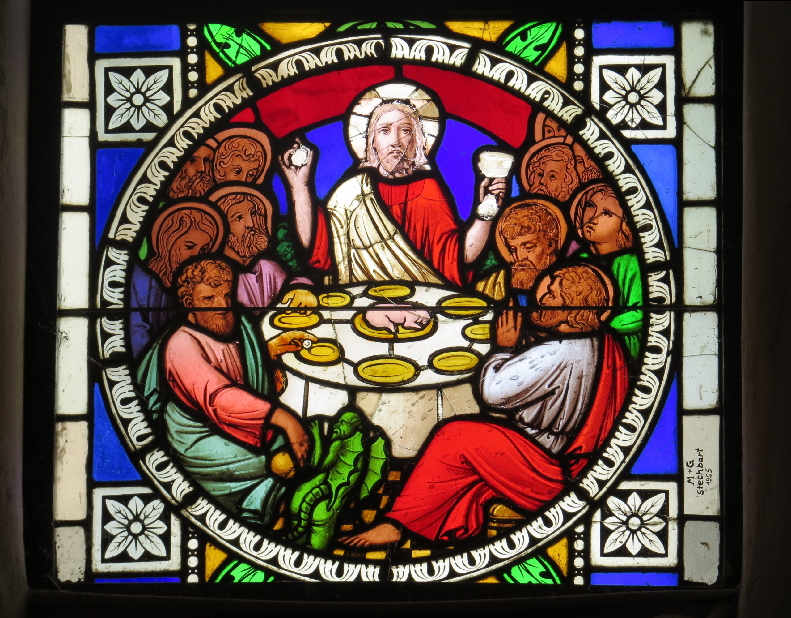 Inneres der ev. Kirche St. Johannes zu Lychen: Schmuckfenster 1